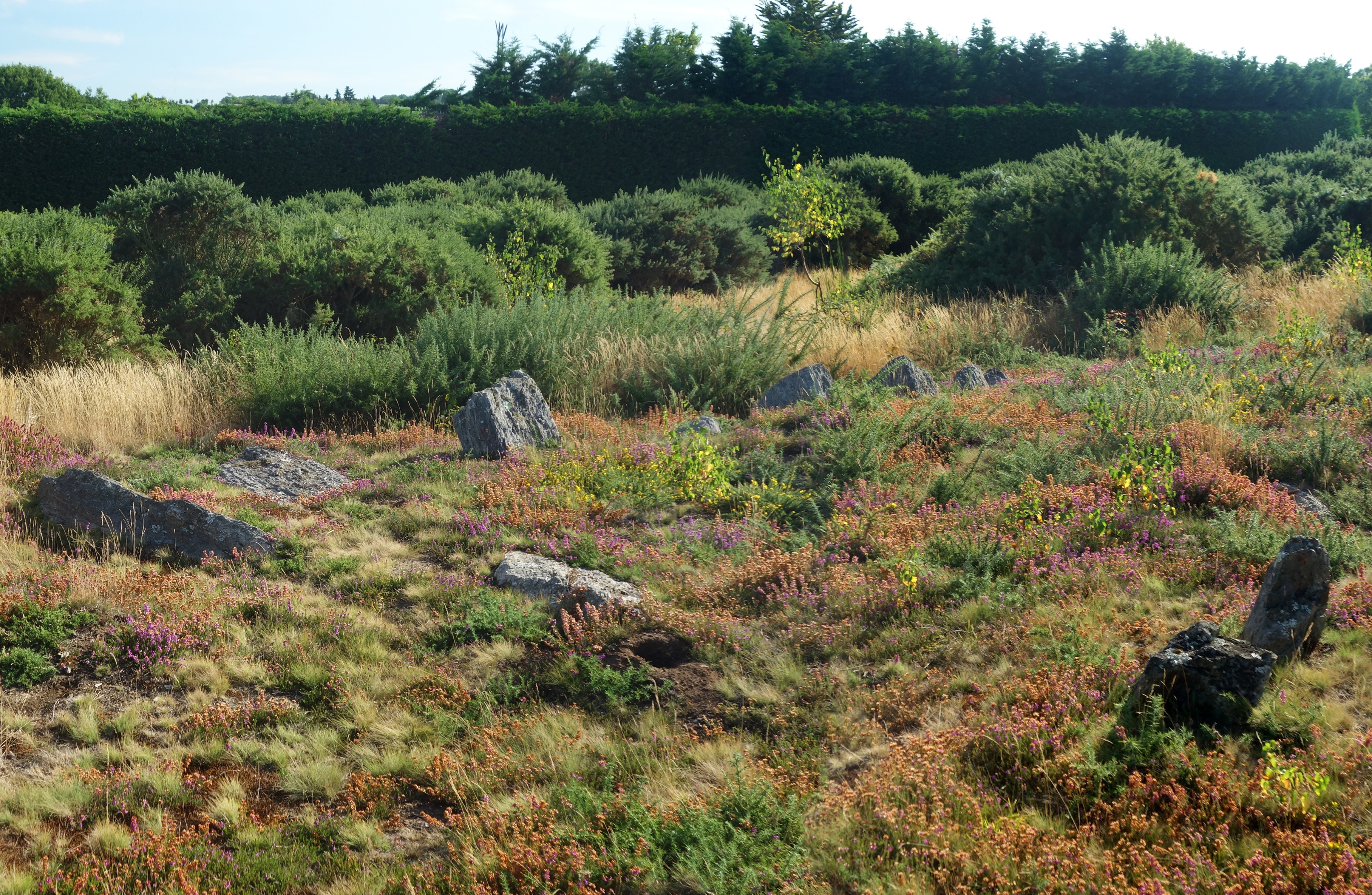 On remarque plusieurs pierres de petites tailles émergeant de la maigre végétation de la lande qui commence ici, tout au bout du bourg de Saint-Just, près du terrain de sport... avant même de pénétrer dans le périmètre aujourd'hui bien balisé suite aux aménagement du site lors de l'année 2018.